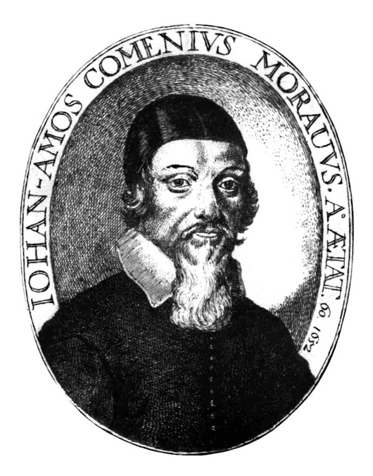 Johann Amos Comenius. Public Domain